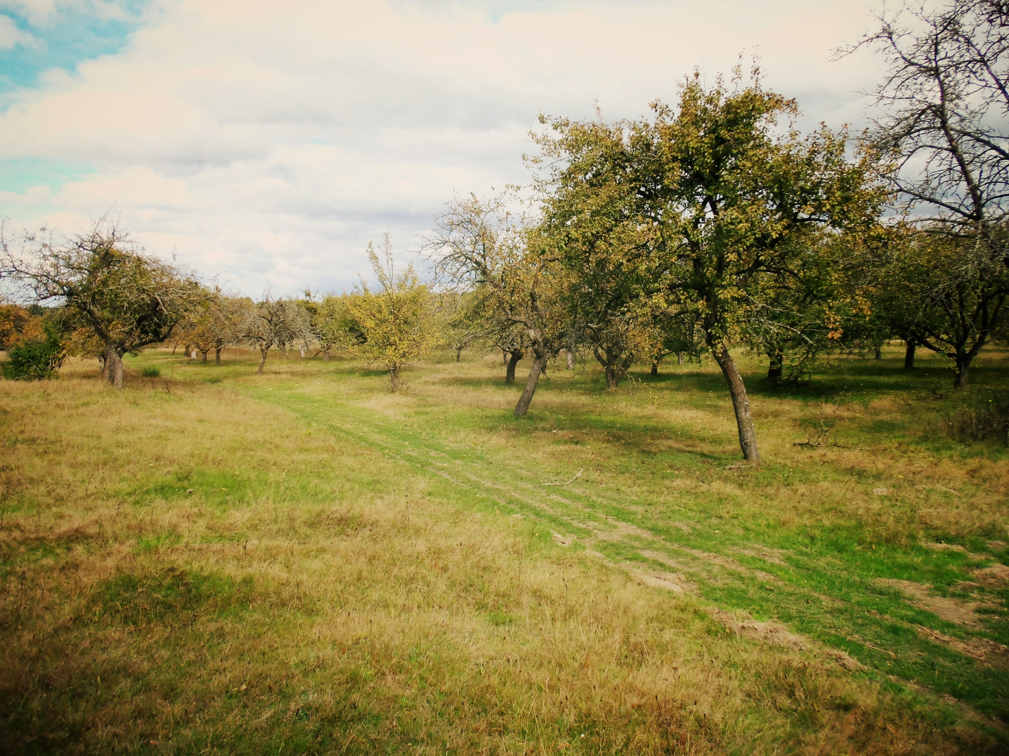 Парк.